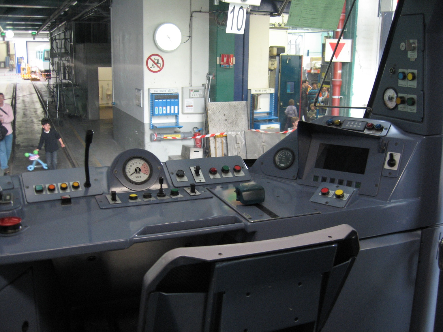 Cabine de conduite d'un MP 89 à l'Atelier de Maintenance des Trains / JPO Ateliers de Saint-Ouen 06/06/2009.